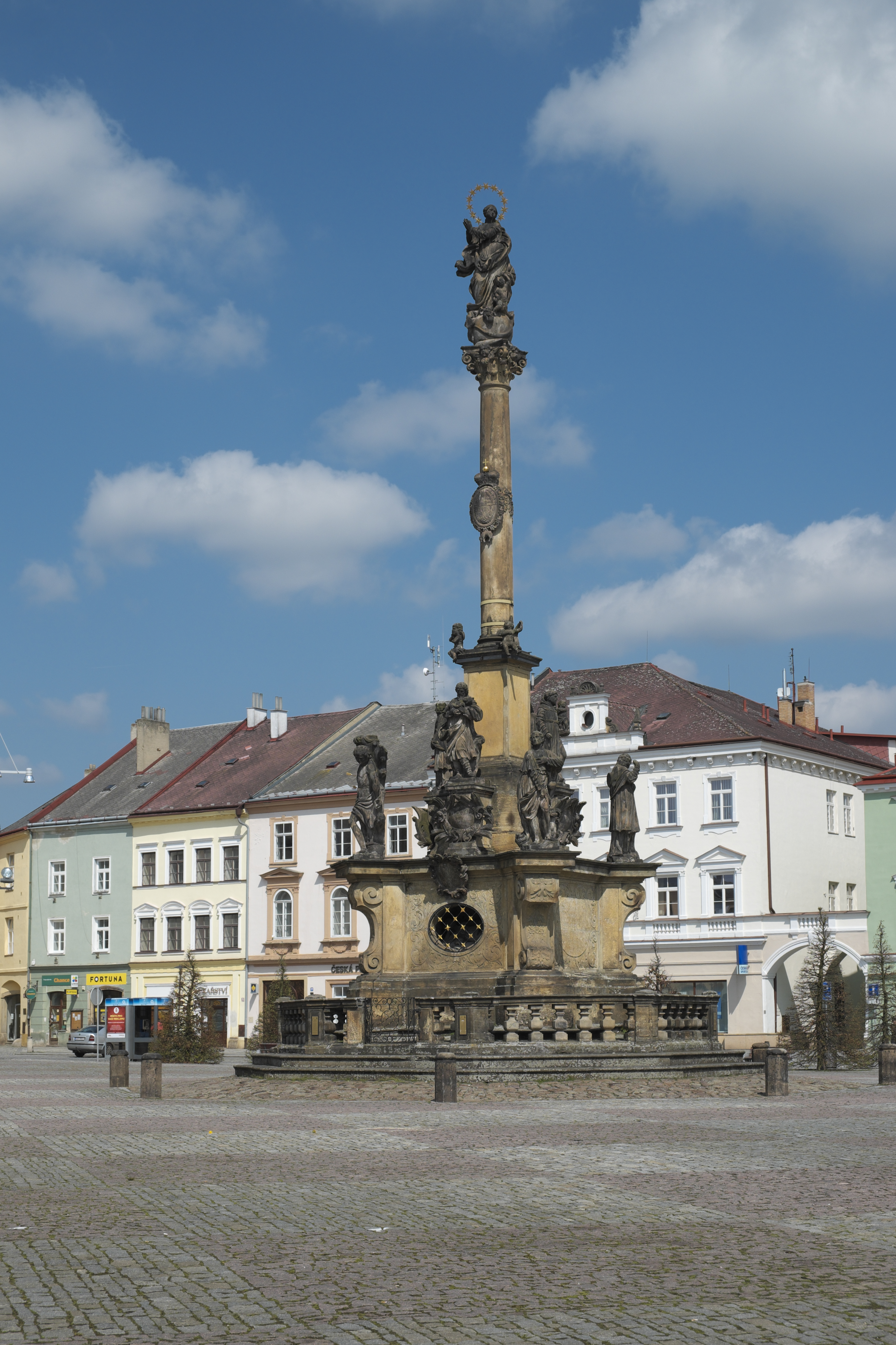 Mariensäule in Moravská Třebová im Okres Svitavy in der Pardubitzer Region in Tschechien